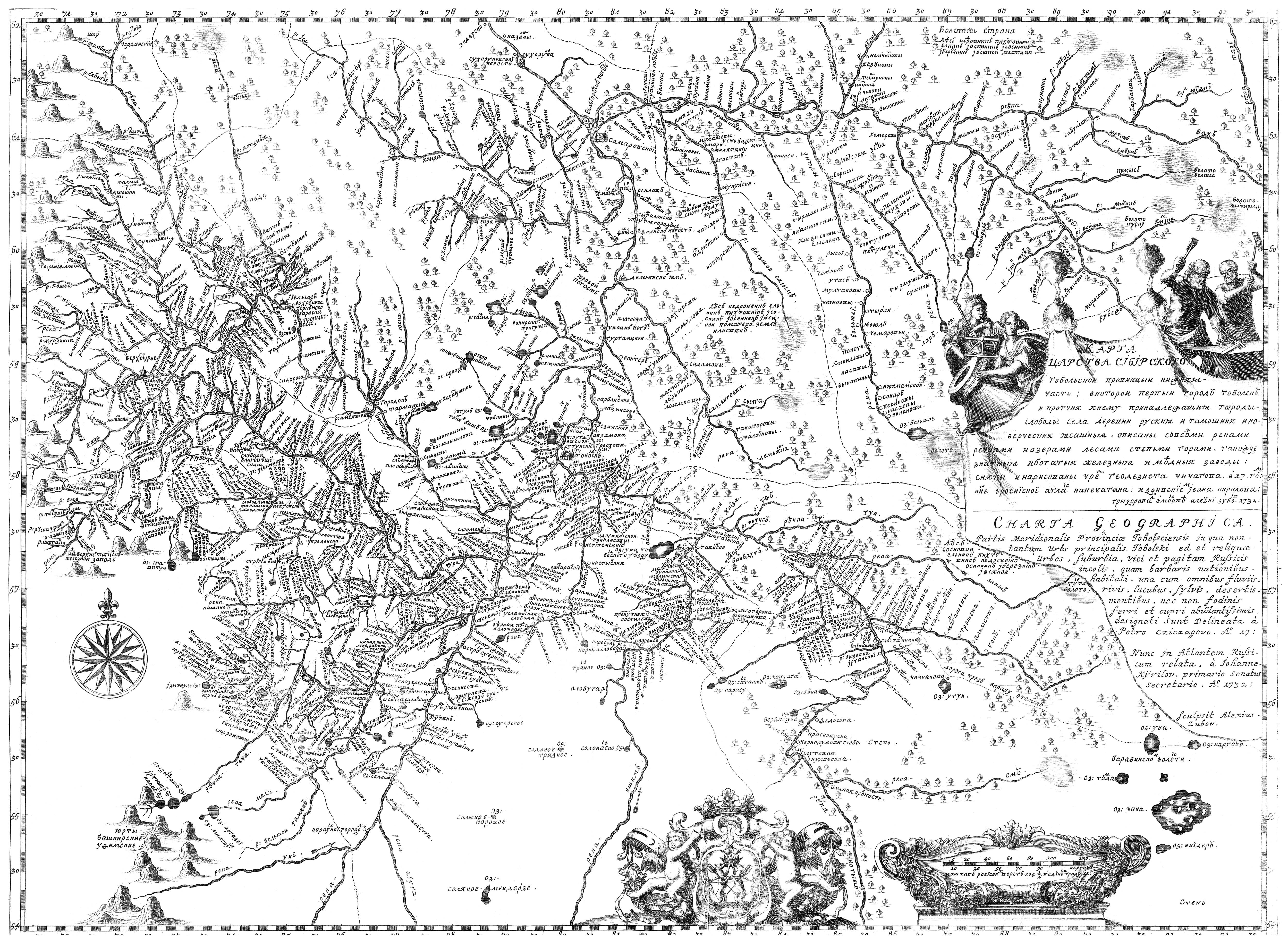 Царство Сибирское в «Атласе Всероссийской империи» И. К. Кириллова. 1722-1737 гг.